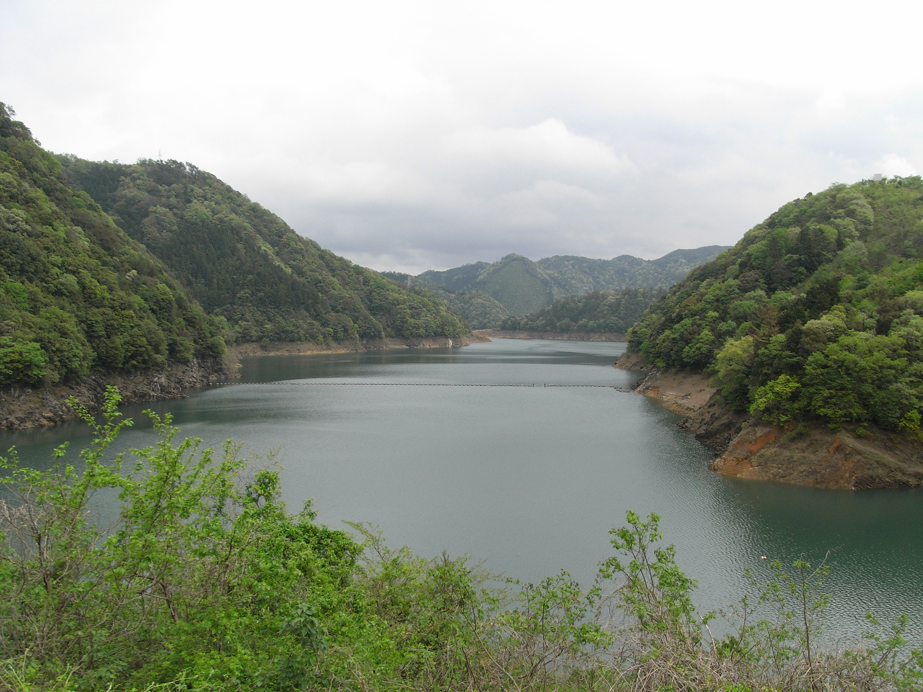 Lake